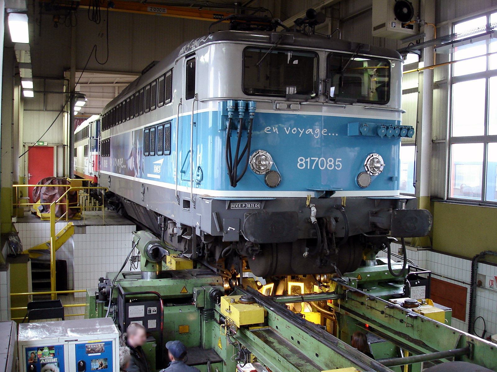 BB 17000 au tour en fosse. Technicentre Paris Nord-Joncherolles, Villetaneuse, Seine-Saint-Denis, France.